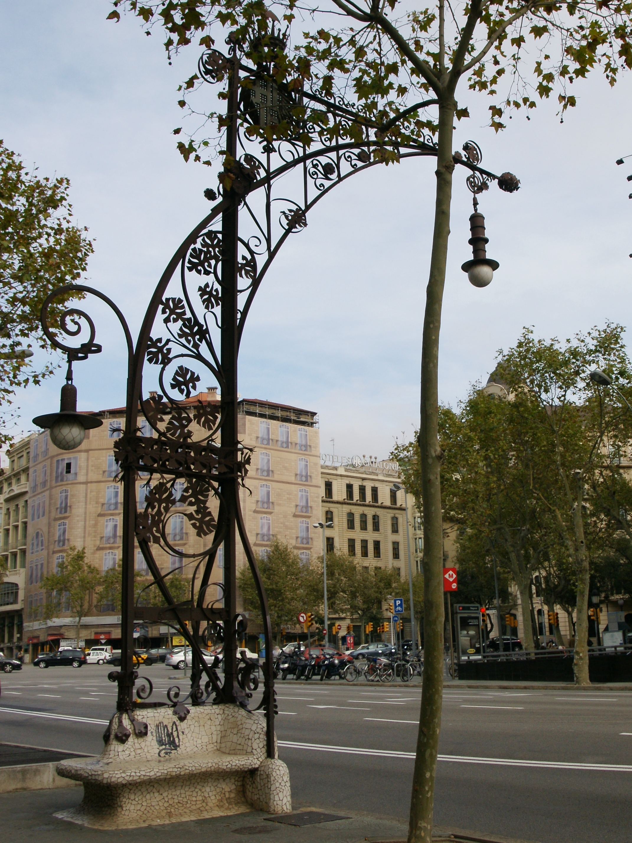 Die Passeig de Gràcia wird mit prachtvollen Kombinationen aus Sitzbänken und abends beleuchtenden Kandelabern nach Entwürfen Pere Falqués (1906) möbliert.